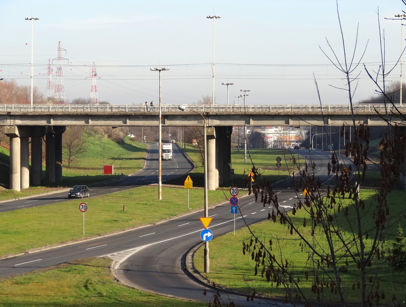 Aleja Jana Pawła II w Bydgoszczy - wiadukt w ciągu al. Wojska Polskiego